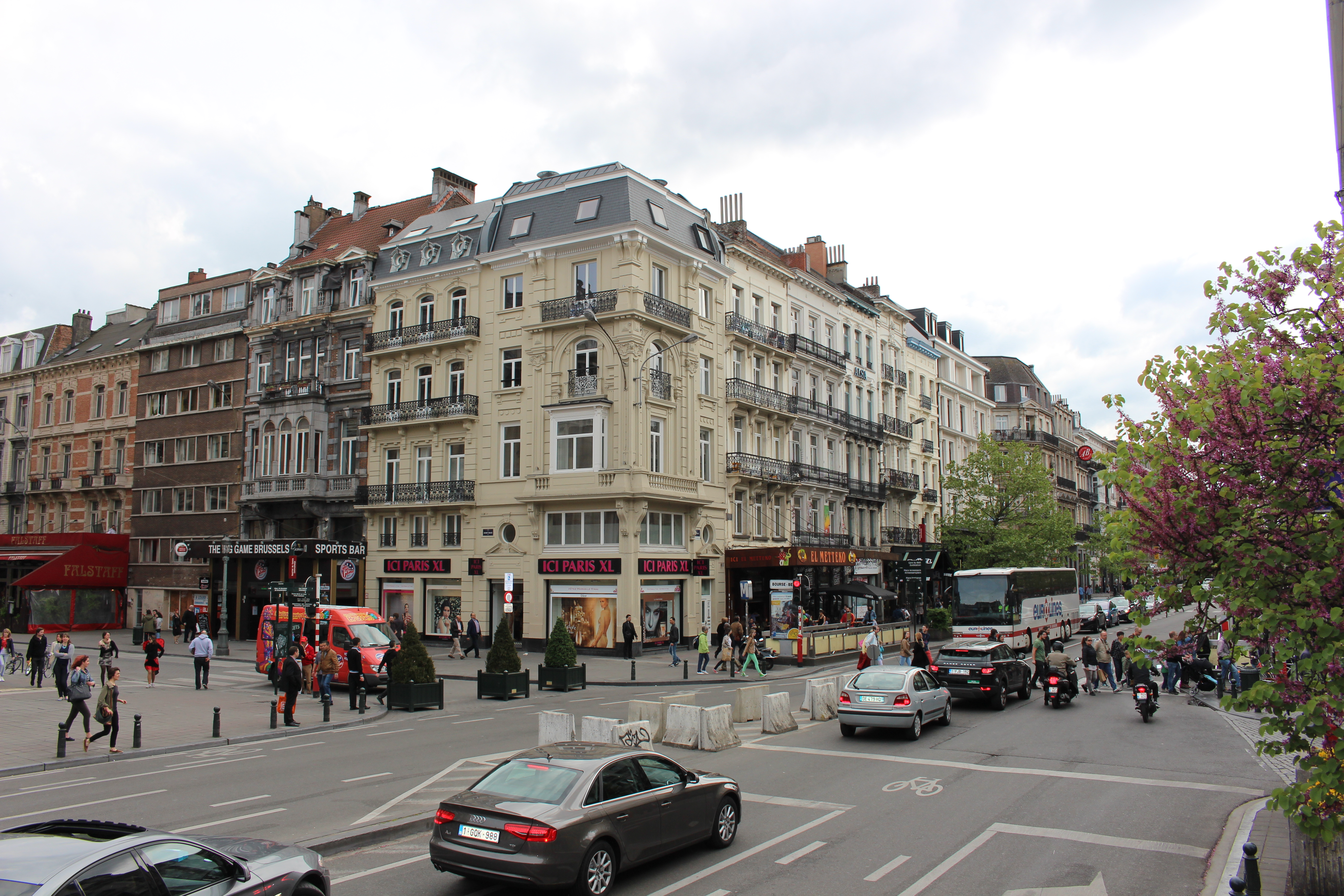 Бульвар Анспаш (Boulevard Anspach, Anspachlaan)